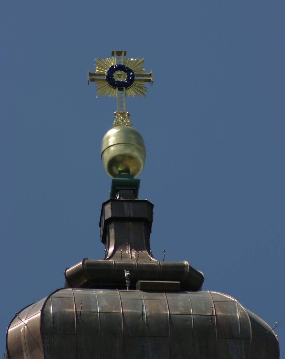 Das Kuppelkreuz der Frauenkirche (Dresden)